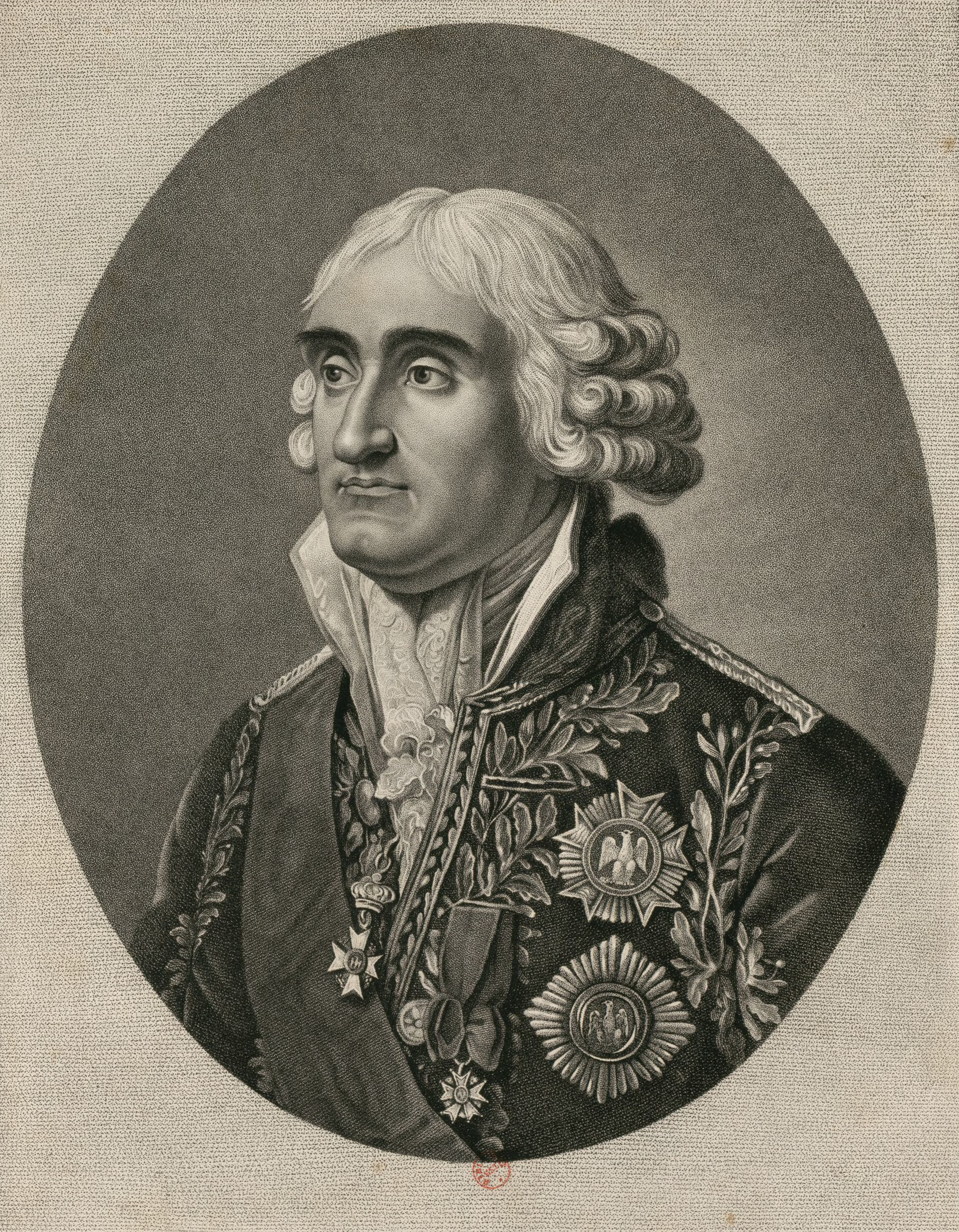 S.A.S. Mgr. le Duc de Parme. Prince Archichancelier de l'Empire. Peint par Boilly d'après le buste fait d'après nature par M. Roland, membre de l'Institut, gravé par Melle J.-M. Gaillard-Monet, élève de MM. Regnault et Ruotte, estampe.